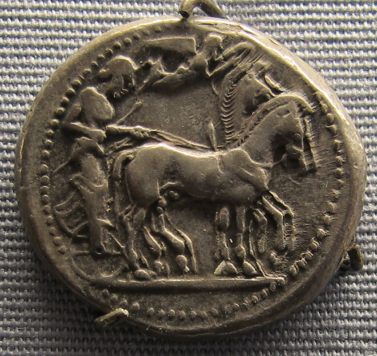 Gela, tetradracma, 480-450 ac. ca